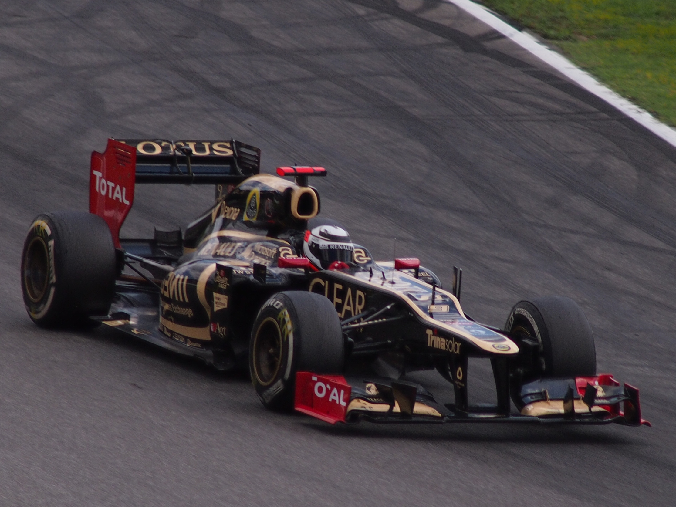 Kimi